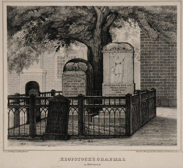 Klopstock´s Grabmal in Ottensen. Lithographie von Asmus Kaufmann um 1840. Druck und Verlag des lithographischen Instituts von Charles Fuchs in Hamburg. Maße: Papier: H: 31 cm, B: 41,3 cm; Bild: H: 21,5 cm, B: 26,1 cm.